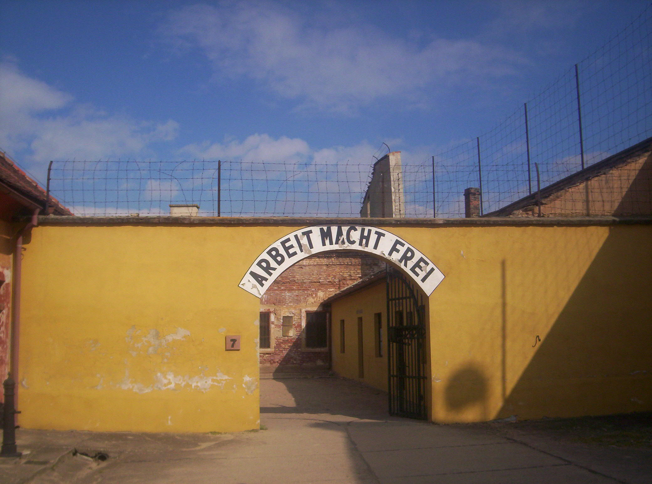 Entrada del Patio Número Uno, en la Fortaleza pequeña de Terezín, la cual usaban los nazis como cárcel de la Gestapo (parte de esta fortaleza también fue usada como carcel durante El Imperio austrohúngaro o Monarquía austrohúngara). La expresión „Arbeit macht frei“ (El trabajo hace libre) fue mandada a poner allí por el jefe de la prisión Heinrich Jöckel después de su visita al campo de exterminio de Auschwitz. Esta expresión fue colocada en la entrada de muchos campos de concentración nazi como una especie de declaración mística, que a través de un trabajo continuo y sin descanso se podría obtener de algún modo la libertad espiritual.